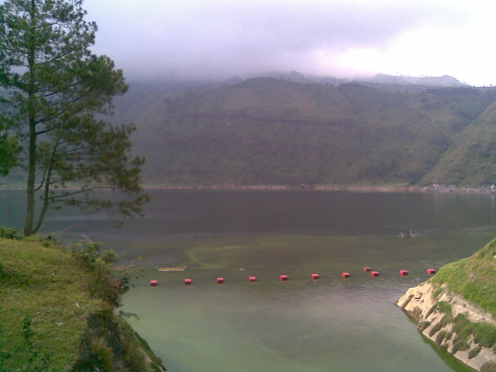 Le lac Menjer